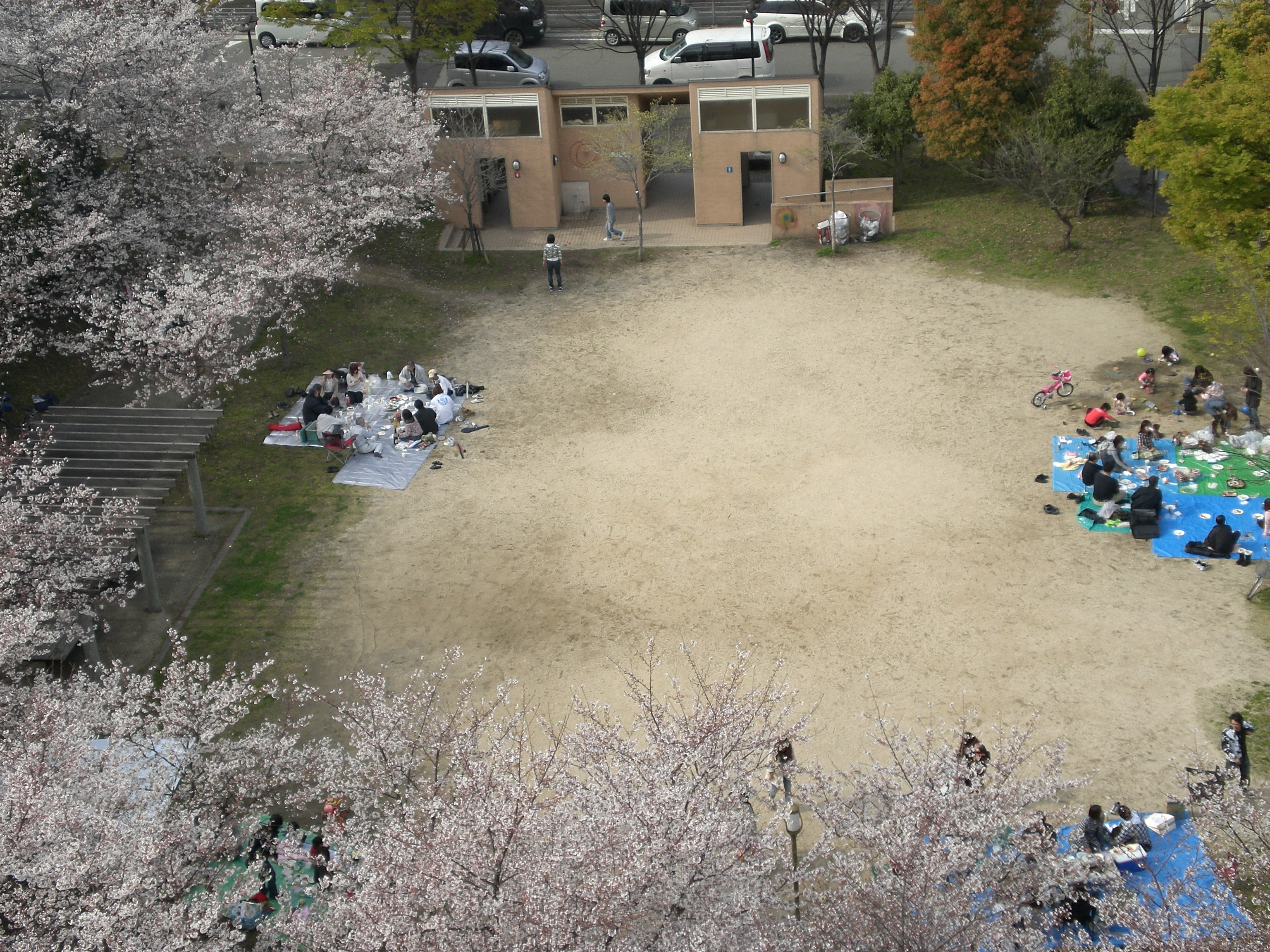 説明=南津守中央公園の広場での花見の様子 出典=投稿者 製作日=2008年4月5日